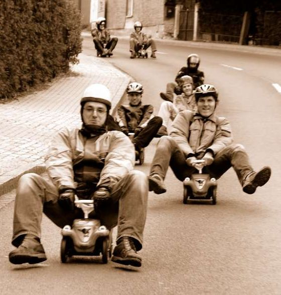 Bobbycar-Rennen/Start